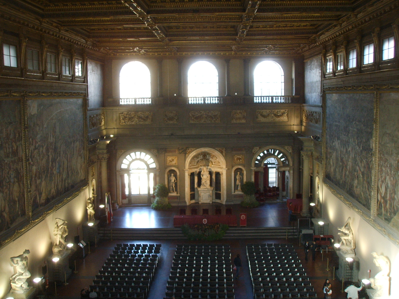 Palazzo vecchio, salone dei 500 view